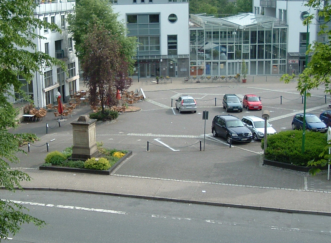 Kleines Kriegerdenkmal an der Bahnhofstraße/Bahnhofplatz, Mai 2007